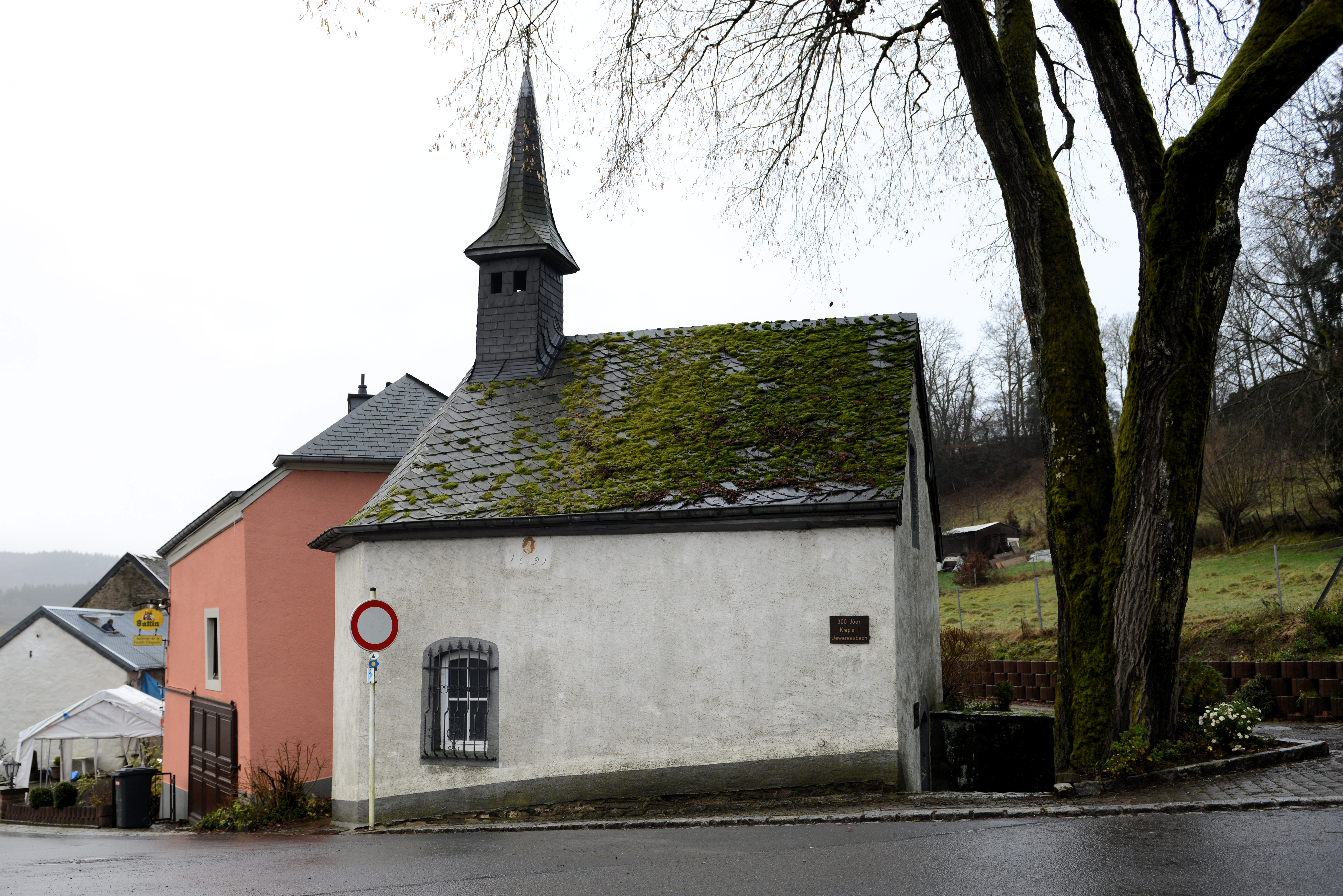 D'Privatkapell Lieners zu Uewereesbech.